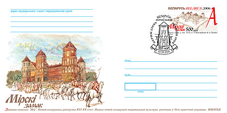 Художественный конверт с оригинальной маркой «500 лет Мирскому замку», издатцентр «Марка» РУП «Белпочта», 2 сентября 2006 года. Иллюстрация - Мирский замок. Замковый комплекс «Мир». Памятник белорусского зодчества XVI-XX вв. 2006 г.